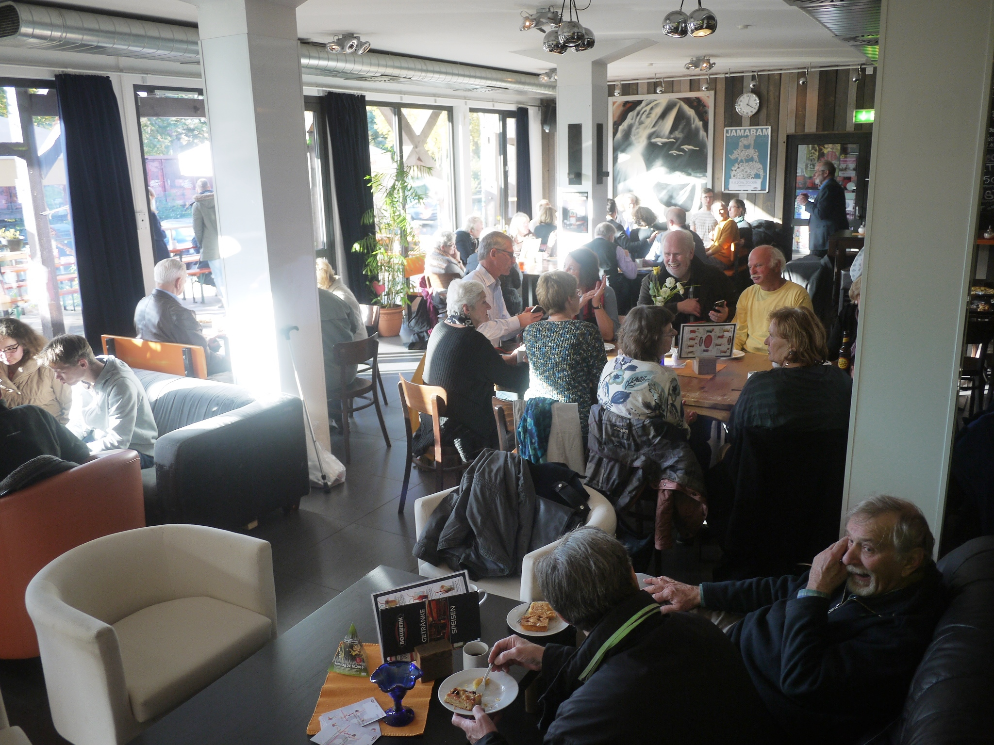 Stolpersteine Moers Nachtreffen der Teilnehmer am Gedenkakt für Karin Alt am 29. Oktober 2016 in der Gaststätte Bollwerk 107